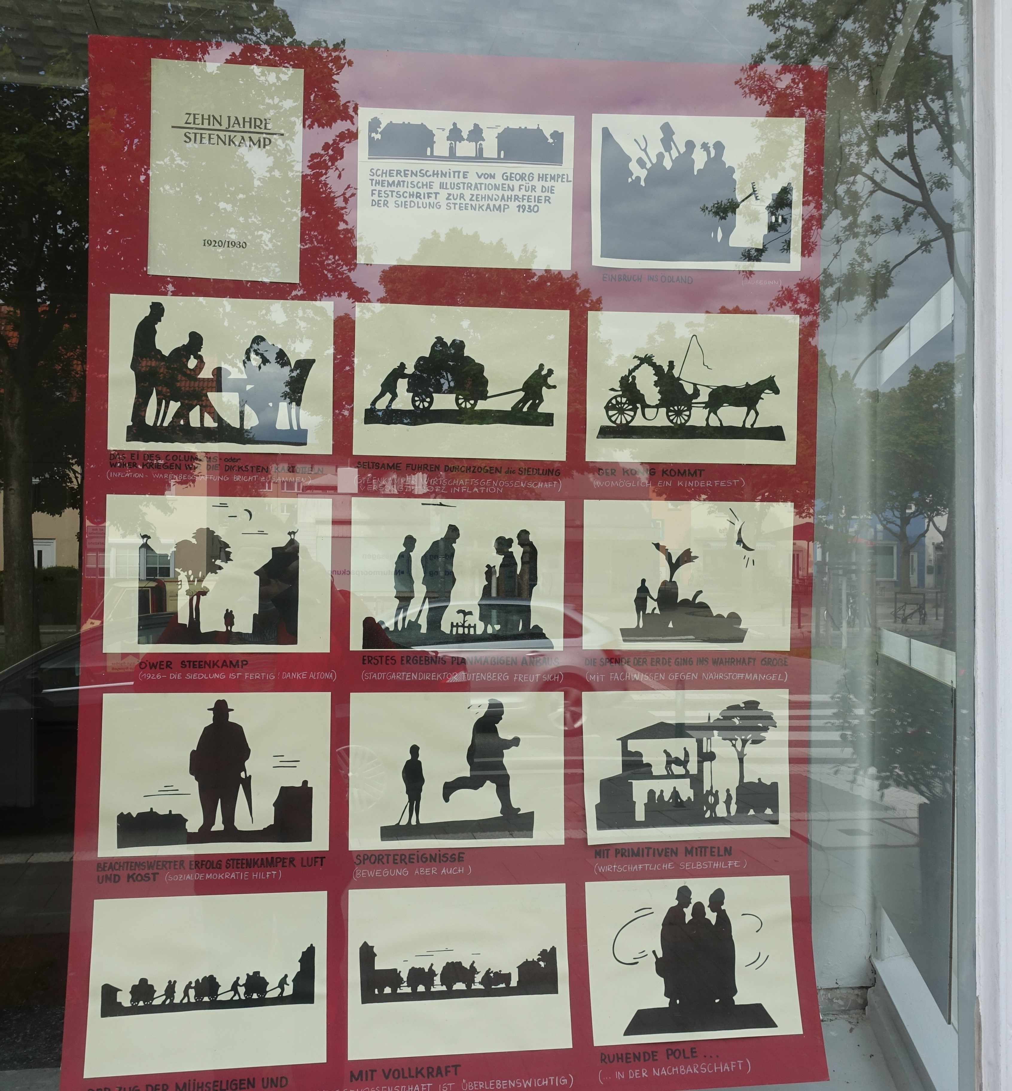 Ausstellung zu Georg Hempel in der Steenkampsiedlung